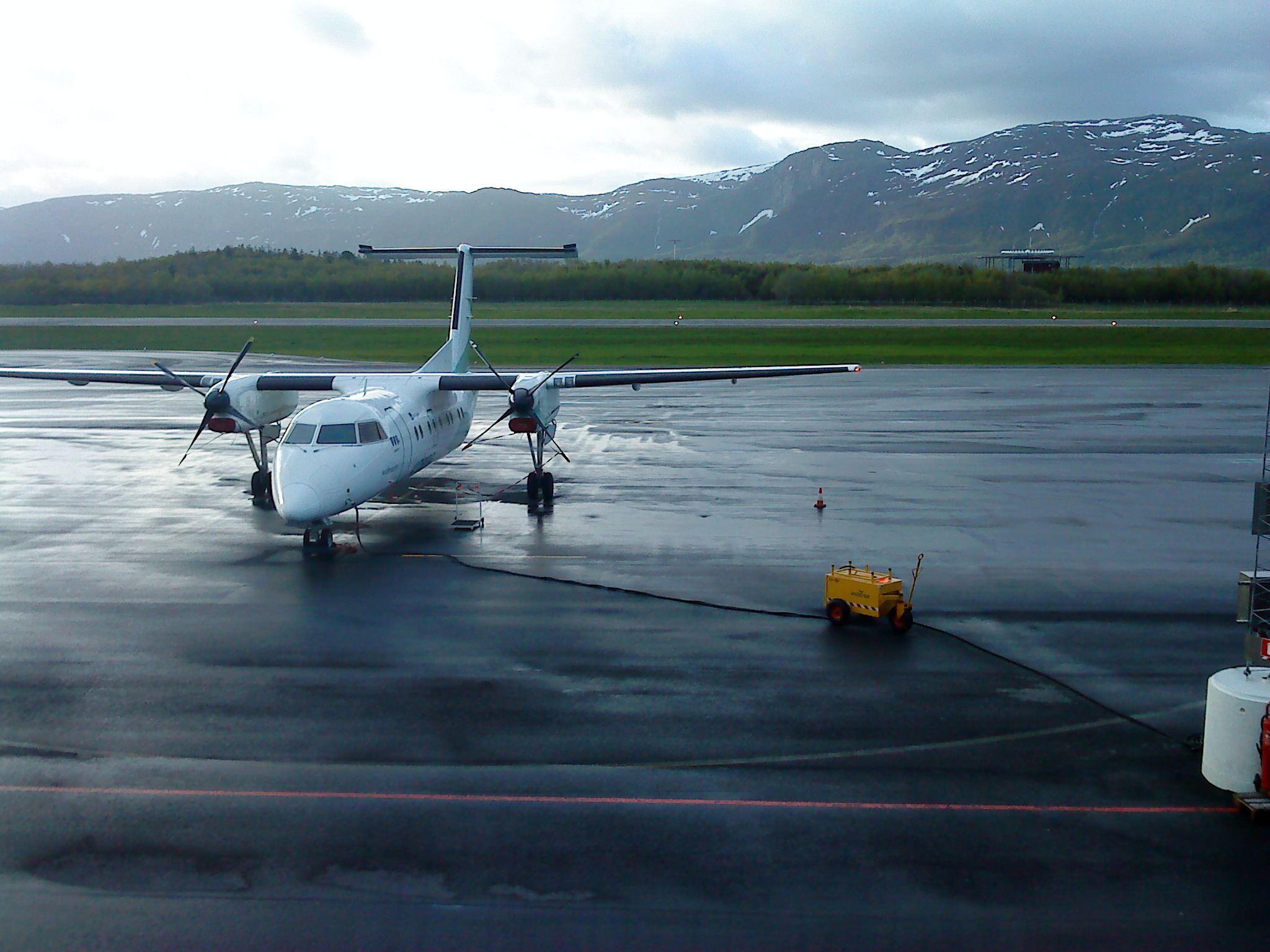 Widerøe Dash 8-100 at Brønnøysund Airport.